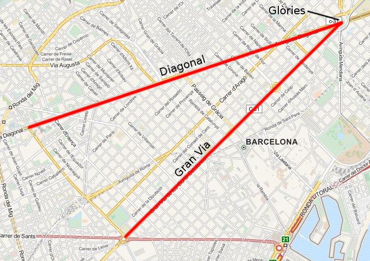 Concentració planejada per la Diada de 2014